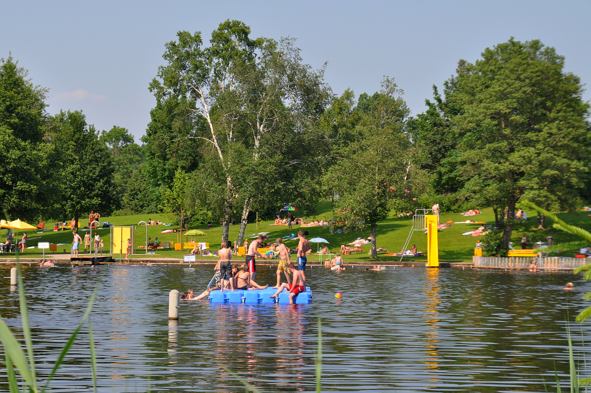 Das Naturfreibad, "Moorbad"